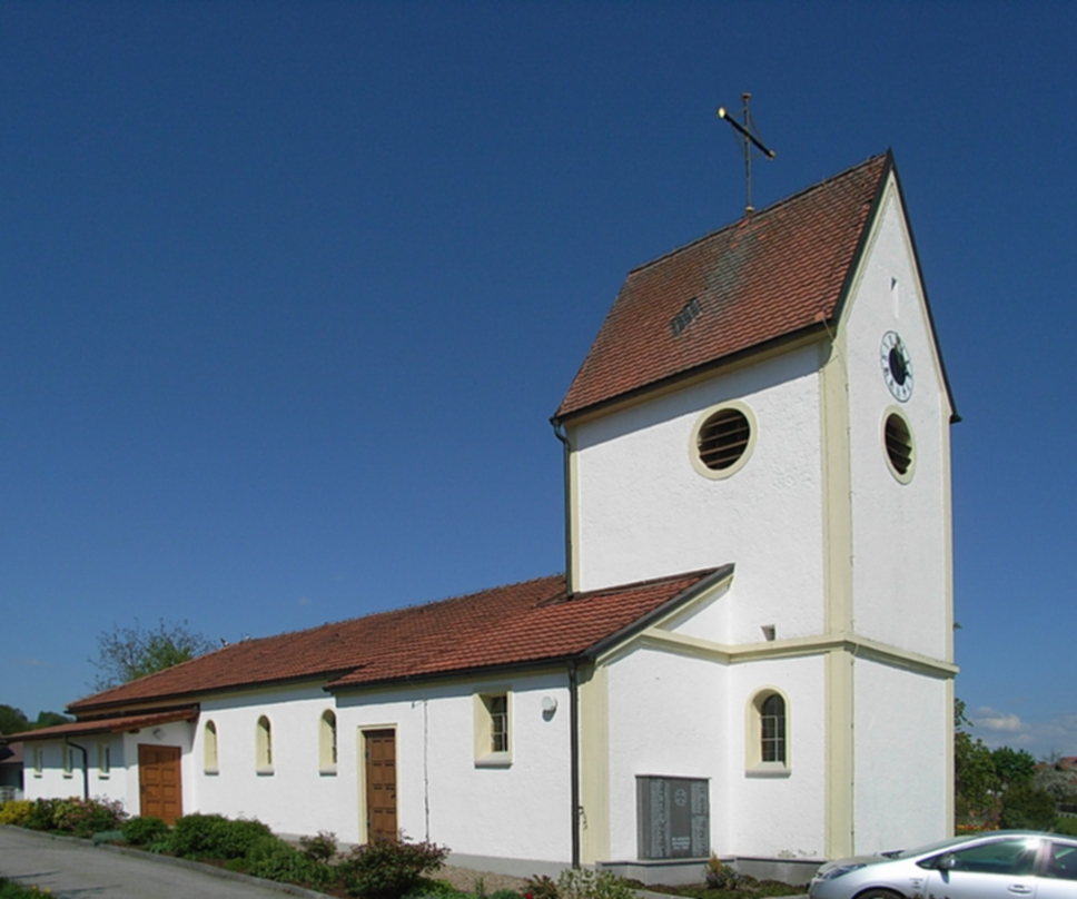 Filialkirche Hl. Herz Jesu in Enzersdorf, Gemeinde Witzmannsberg